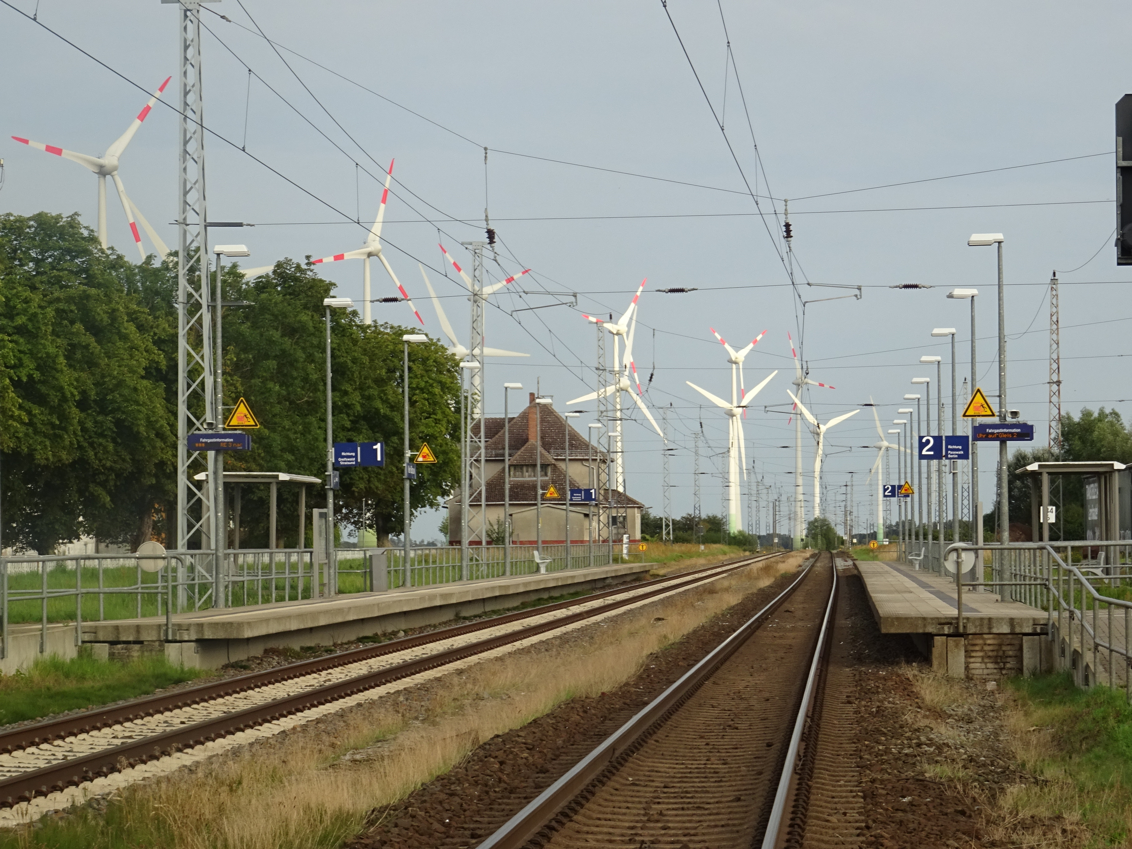 Bahnhof Klein Bünzow, Bahnsteige